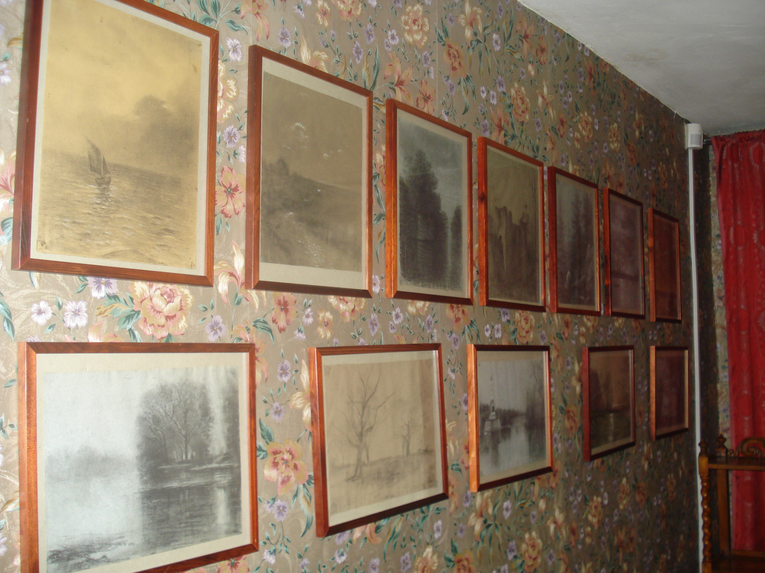 Pictures by Varvara Pushkina (d. 1935). Alexander Pushkin Museum in Vilnius. Varvaros Puškinos piešiniai (Literatūrinis Aleksandro Puškino muziejus. Subačiaus g. 124)